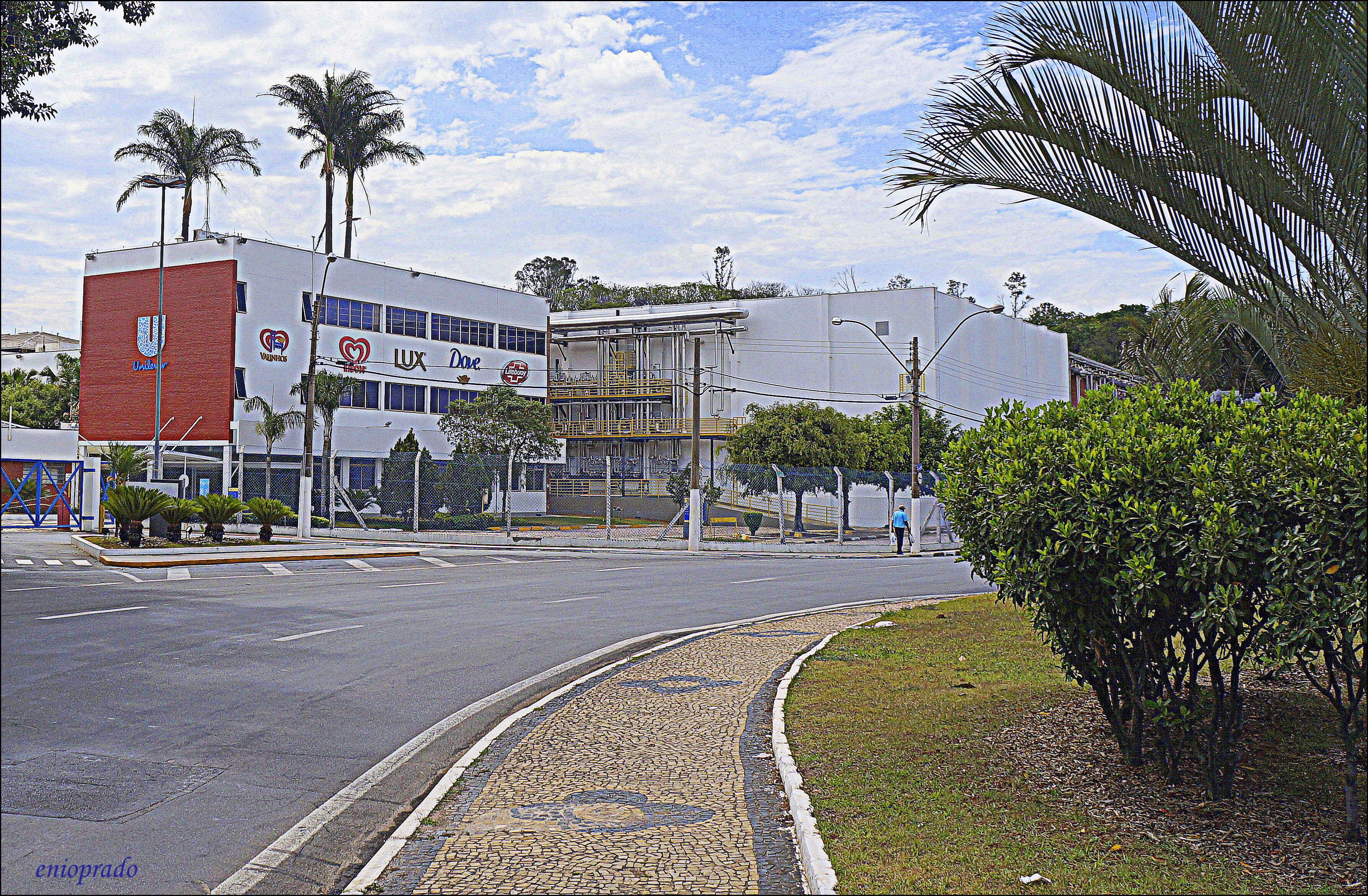 Unilever